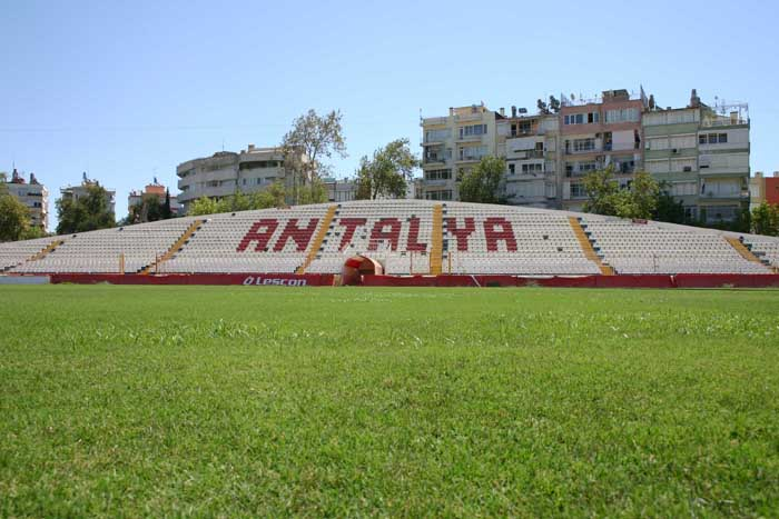 Antalya Ataturk stadium